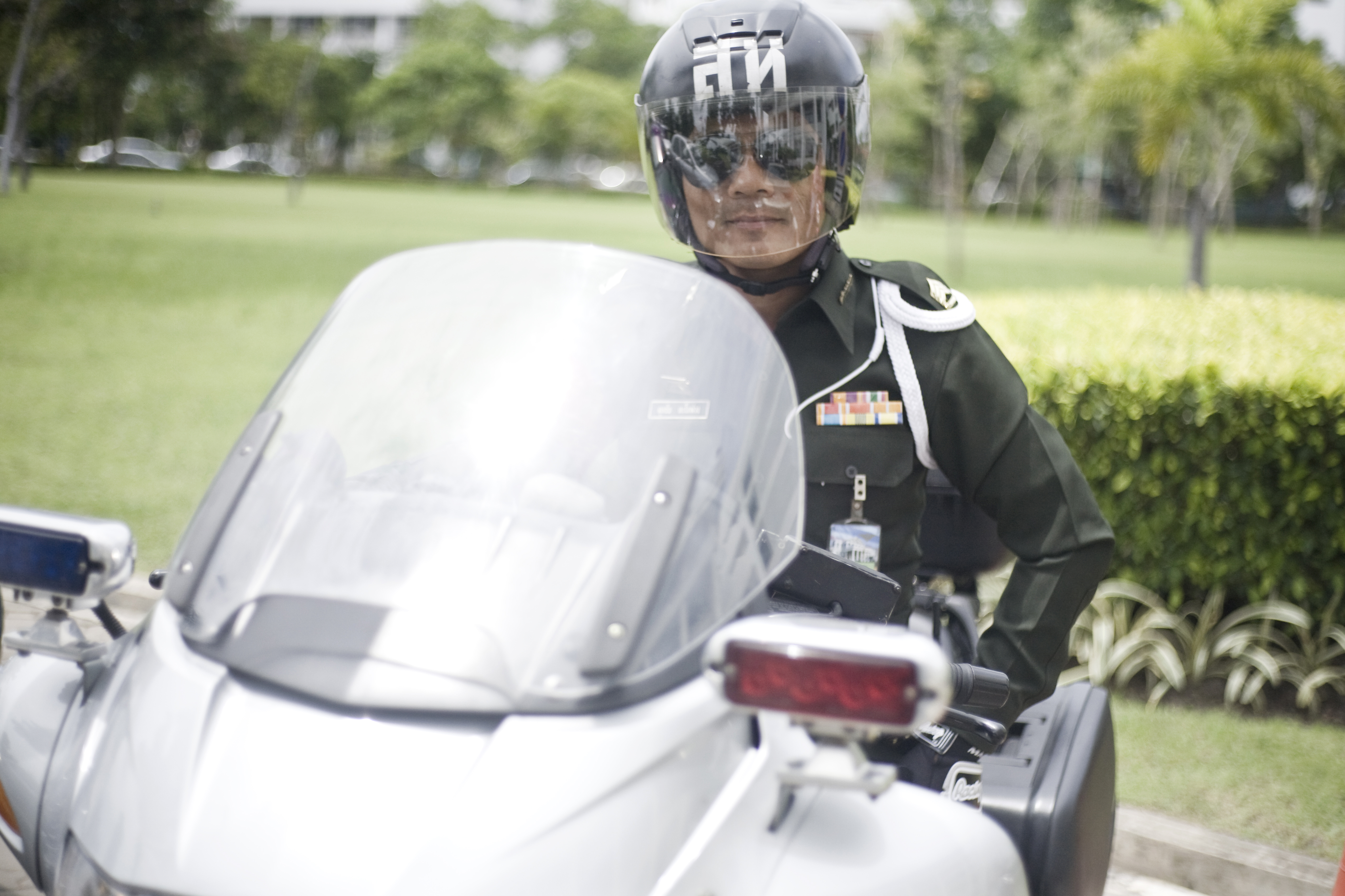 นรม.เป็นประธานการประชุมหัวหน้าส่วนราชการระดับปลัดกระทรวง ณ กระทรวงสาธารณสุข 30กรกฎาคม2552 (The Official Site of The Prime Minister of Thailand Photo by พีรพัฒน์ วิมลรังครัตน์)